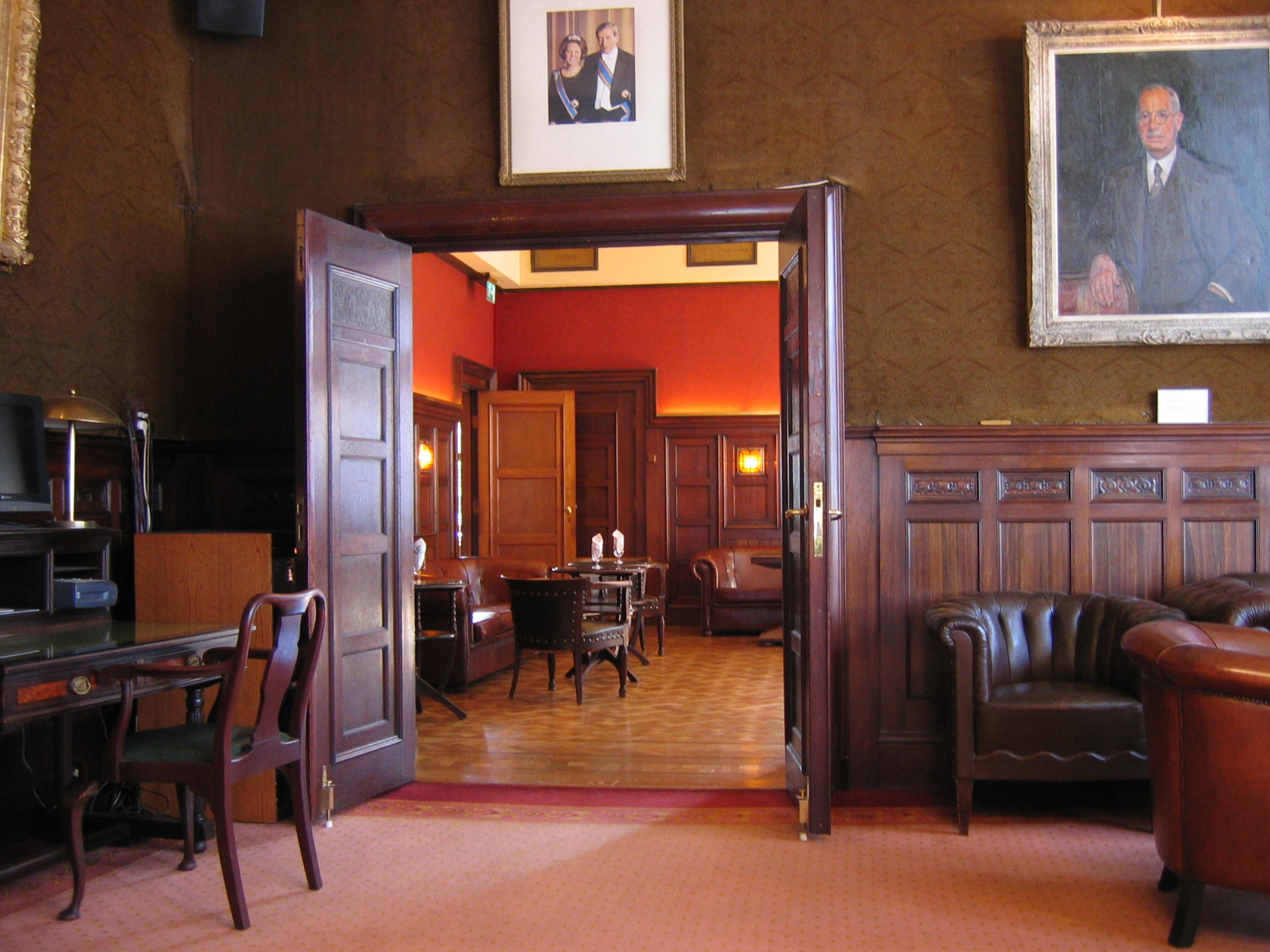 Industrieele Groote Club Amsterdam architect Foeke Kuipers (1912) uitvoering 1913-1916 Rijksmonument Dam 27 1012 JS Amsterdam 9 september 2006 Open Monumentendagen 2006